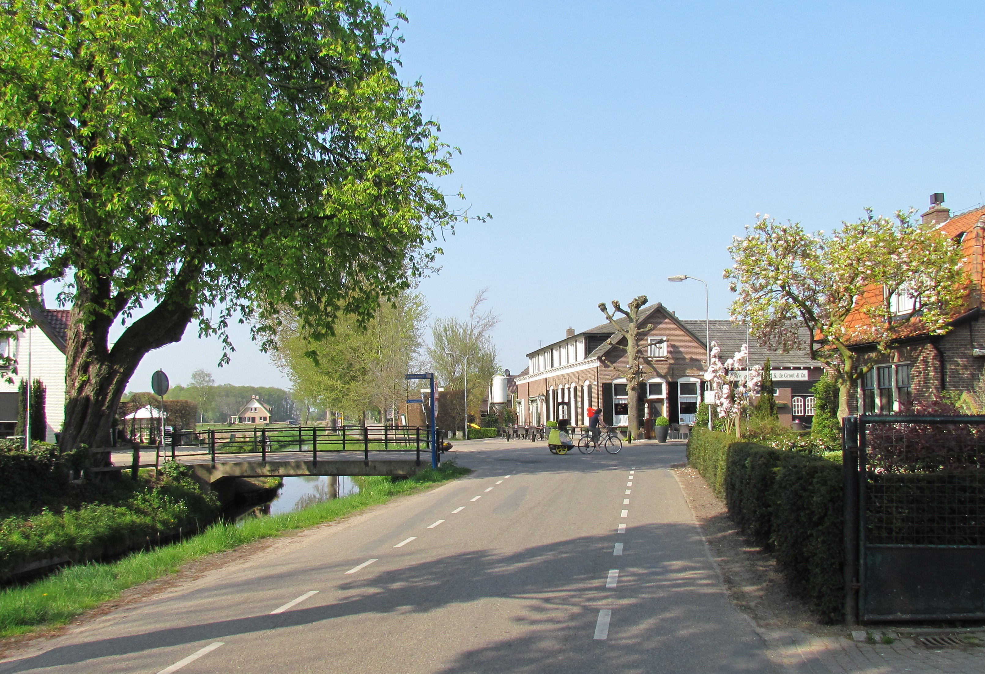 Kruispunt met café De Groot in De Vecht, NL